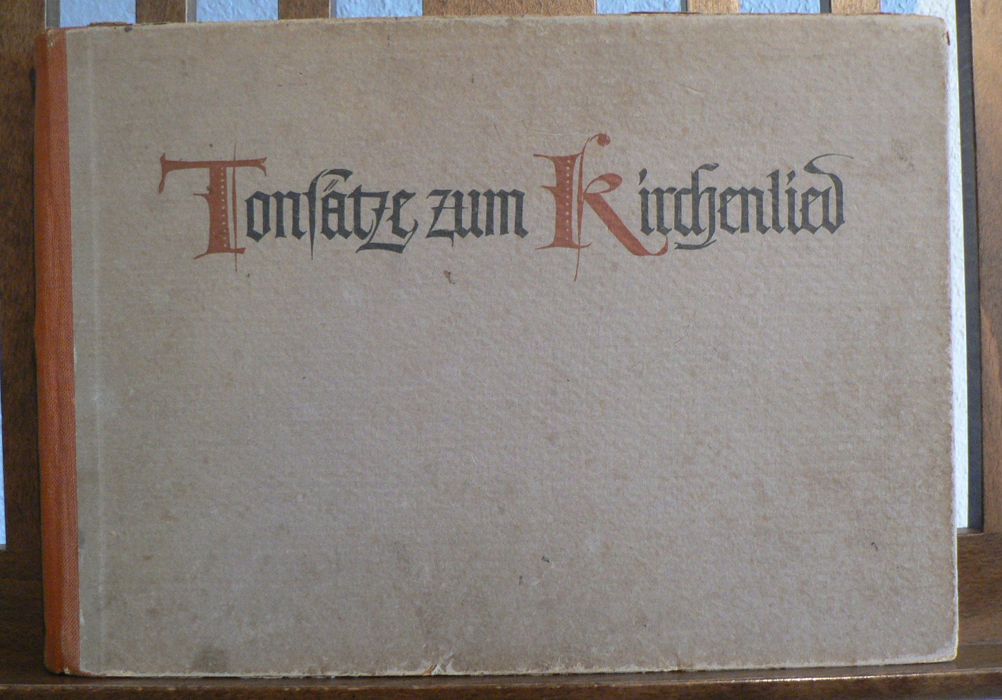 "Tonsätze zum Kirchenlied - für Tasteninstrumente, vierstimmigen gemischten Chor, Streich- und Blasinstrumente", Begleitbuch zum katholischen Gesangbuch "Kirchenlied" von 1938.